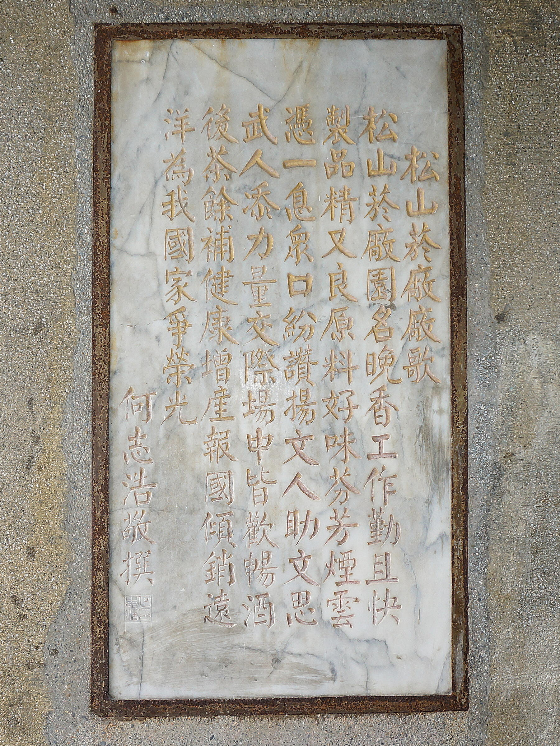 中文（台灣）: 松山菸廠廠歌石碑，位於臺北市松山文化創意園區台灣設計館大門左側，何志浩撰文。